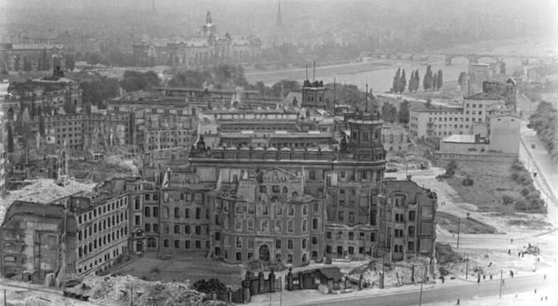 ADN-ZB/Archiv Dresden nach dem britisch-amerikanischen Luftangriff am 13./14.2.1945. Information added by Wikimedia users.Blick vom Rathaus in Richtung Norden, im Vordergrund Ruine des Landhauses